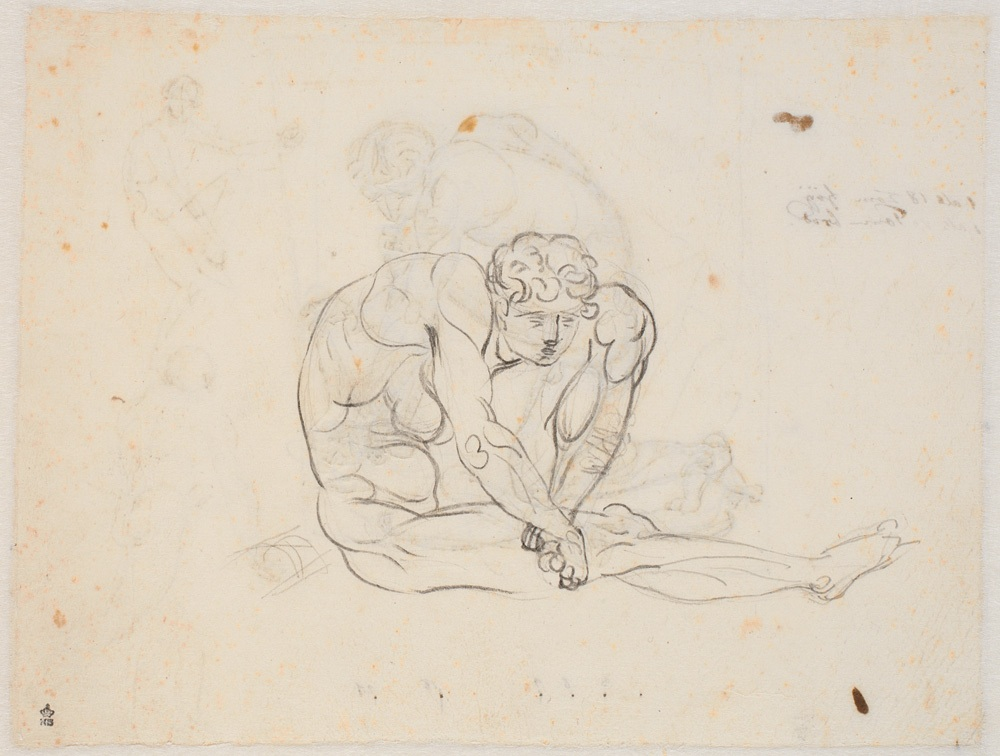 Nicolai Abildgaard Dansk, 11-09-1743 - 04-06-1809 Udkast til Filoktet-figuren, (ca. 1774-1775) TEKNIK: Blyant DIMENSION: 168 x 223 mm ERHVERVELSE: Erhvervelsesår ubekendt. Erhvervet før registrerings påbegyndelse i 1887 - Før 1887 INV.NR.: KKSgb3601 verso